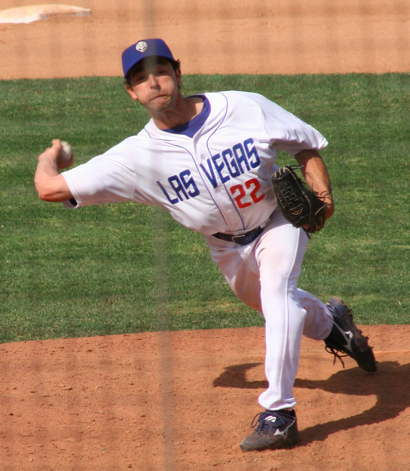 Mike Koplove